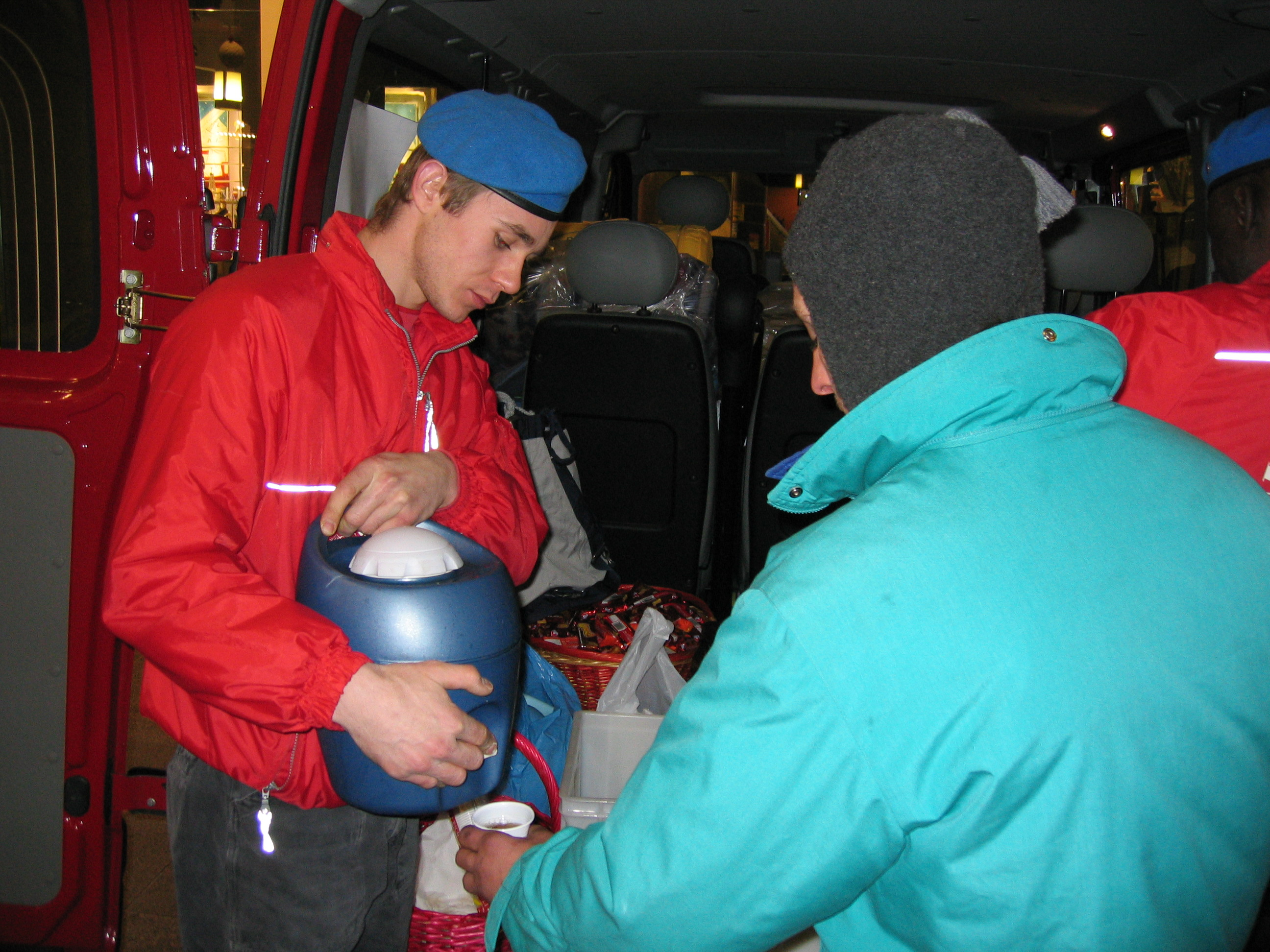 Distribuzione thè a clochard con l'unità mobile